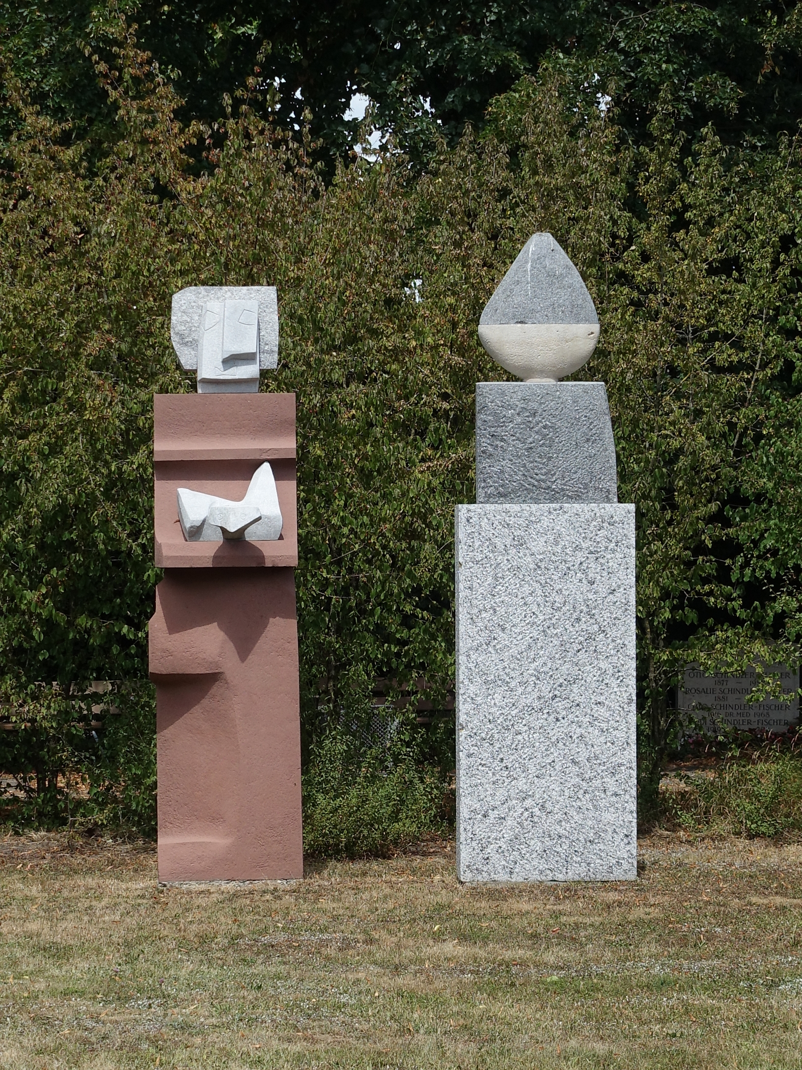 Lorenz Balmer-Gerber (1916-2004), Helene Balmer-Gerber (1924), Gemeinschaftswerk. Skulptur, Frau mit Weihgabe und Wächter, 1993. Granit, Marmor, Kalk- und Sandstein für das anonyme Gemeinschaftsgrab, Friedhof am Hörnli, Basel.